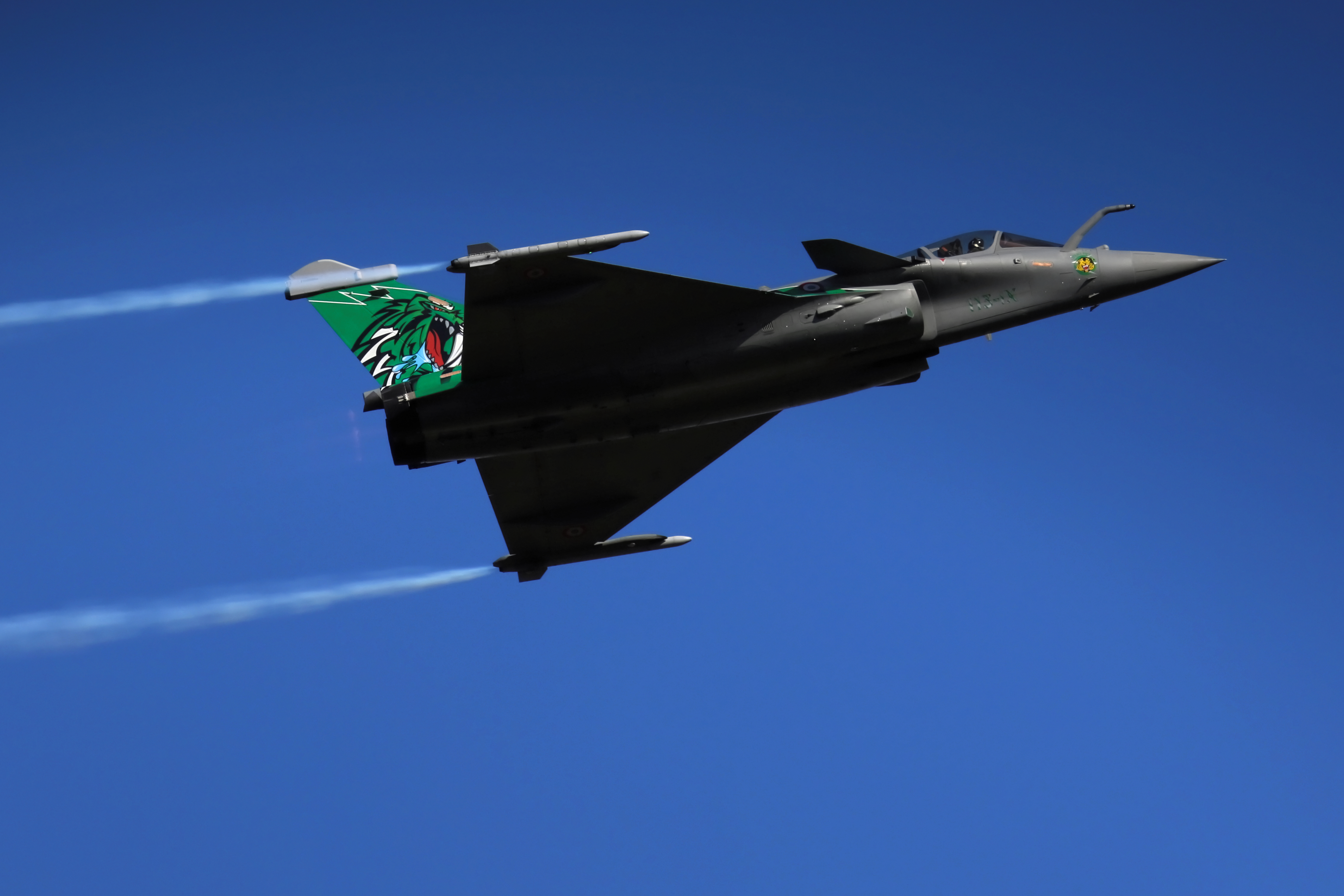 Rafale Tiger Meet 2015 Escadron de Chasse 1/7 Provence, photographié aux 28th FAI World Aerobatic Championships 2015